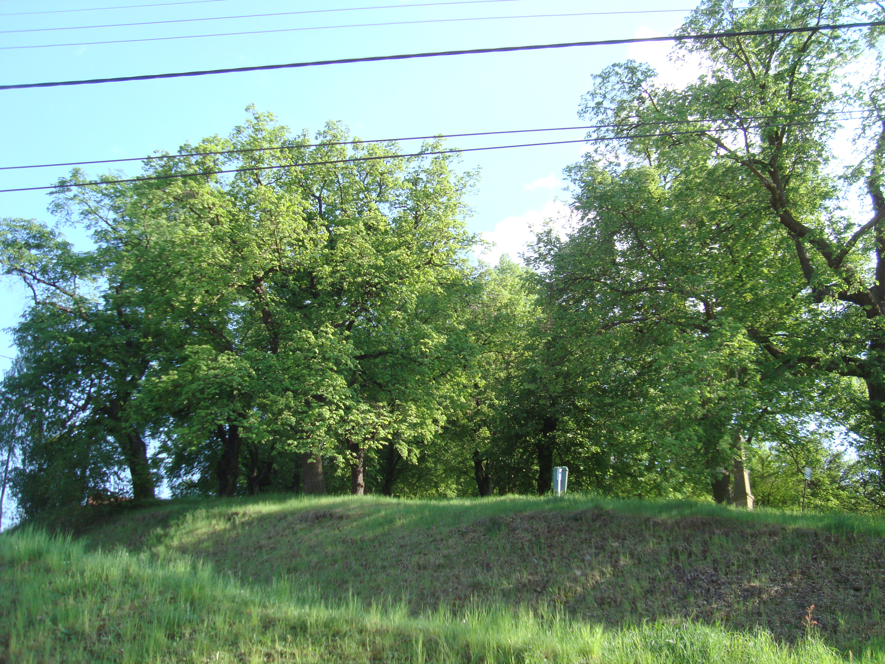 Lipové stromořadí v Rosicích